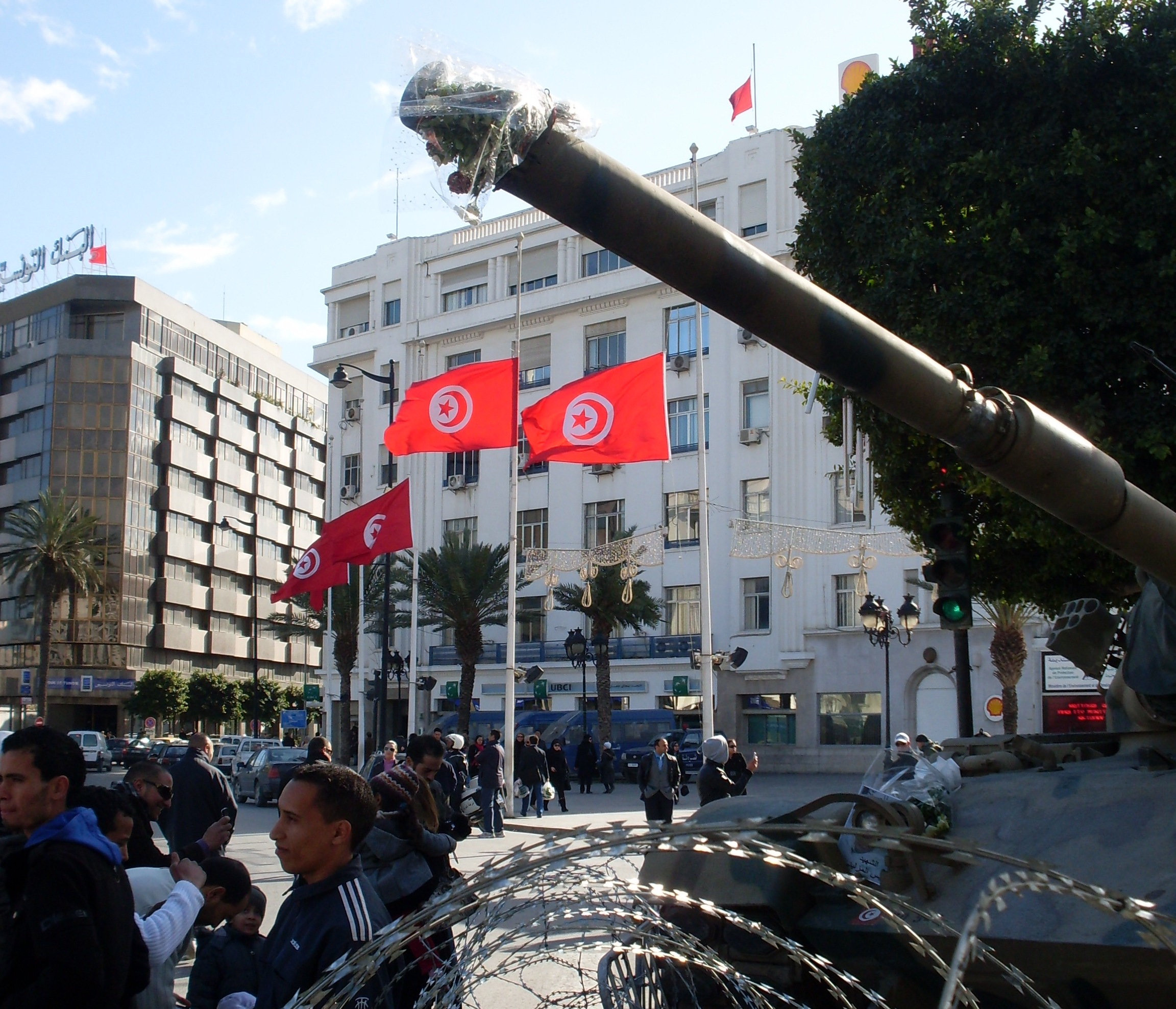 Char à l'entrée de l'Avenue Habib Bourguiba lors de la révolution des Jasmins